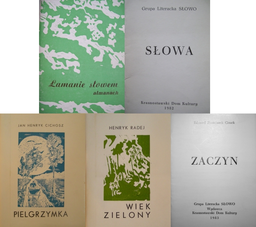 Kolaż okładek zbiorów wierszy i tomików autorskich członków grupy literackiej "Słowo" z Krasnegostawu